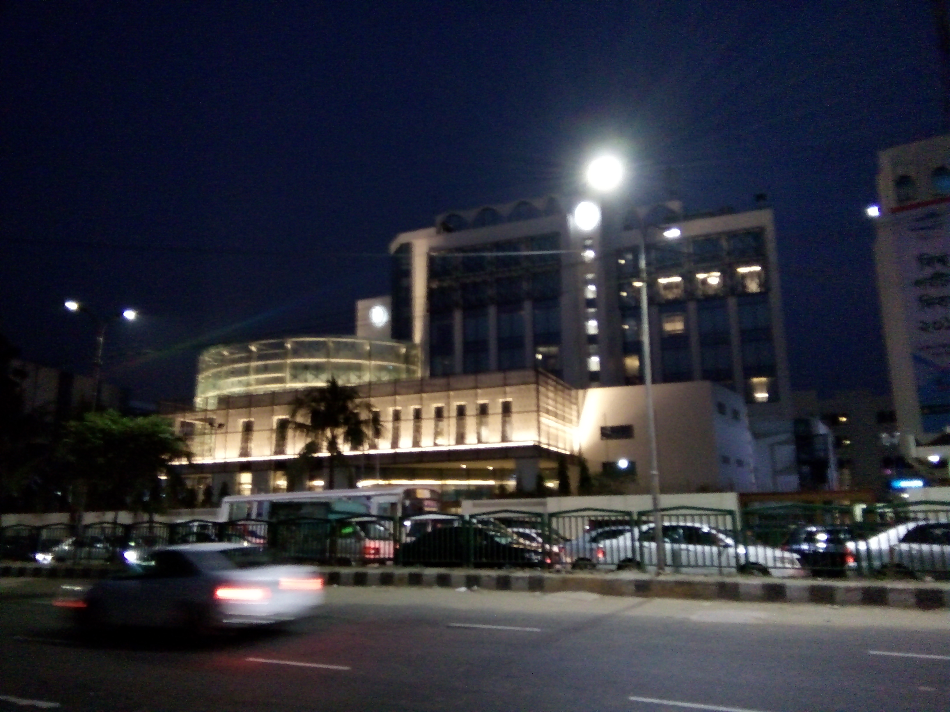 রাতে ইন্টারকন্টিনেন্টাল